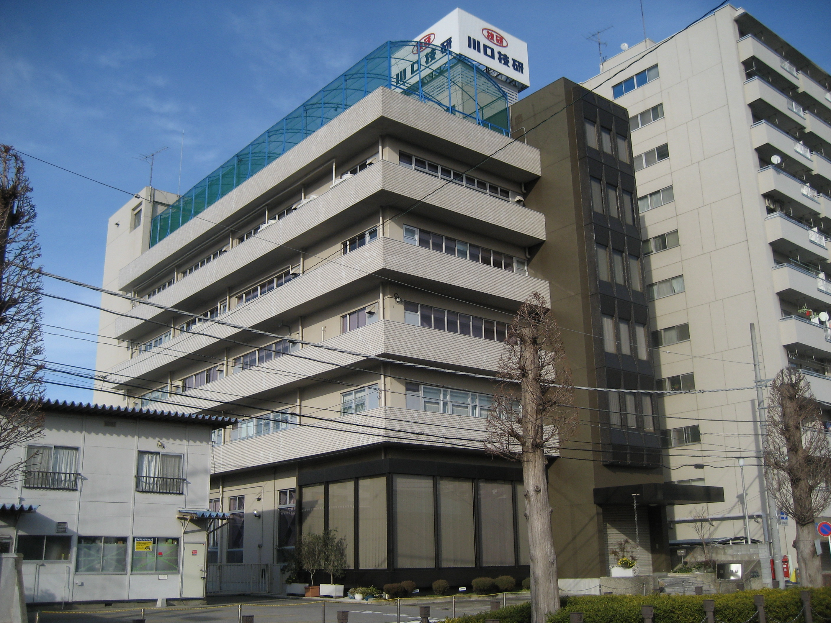 川口技研社屋